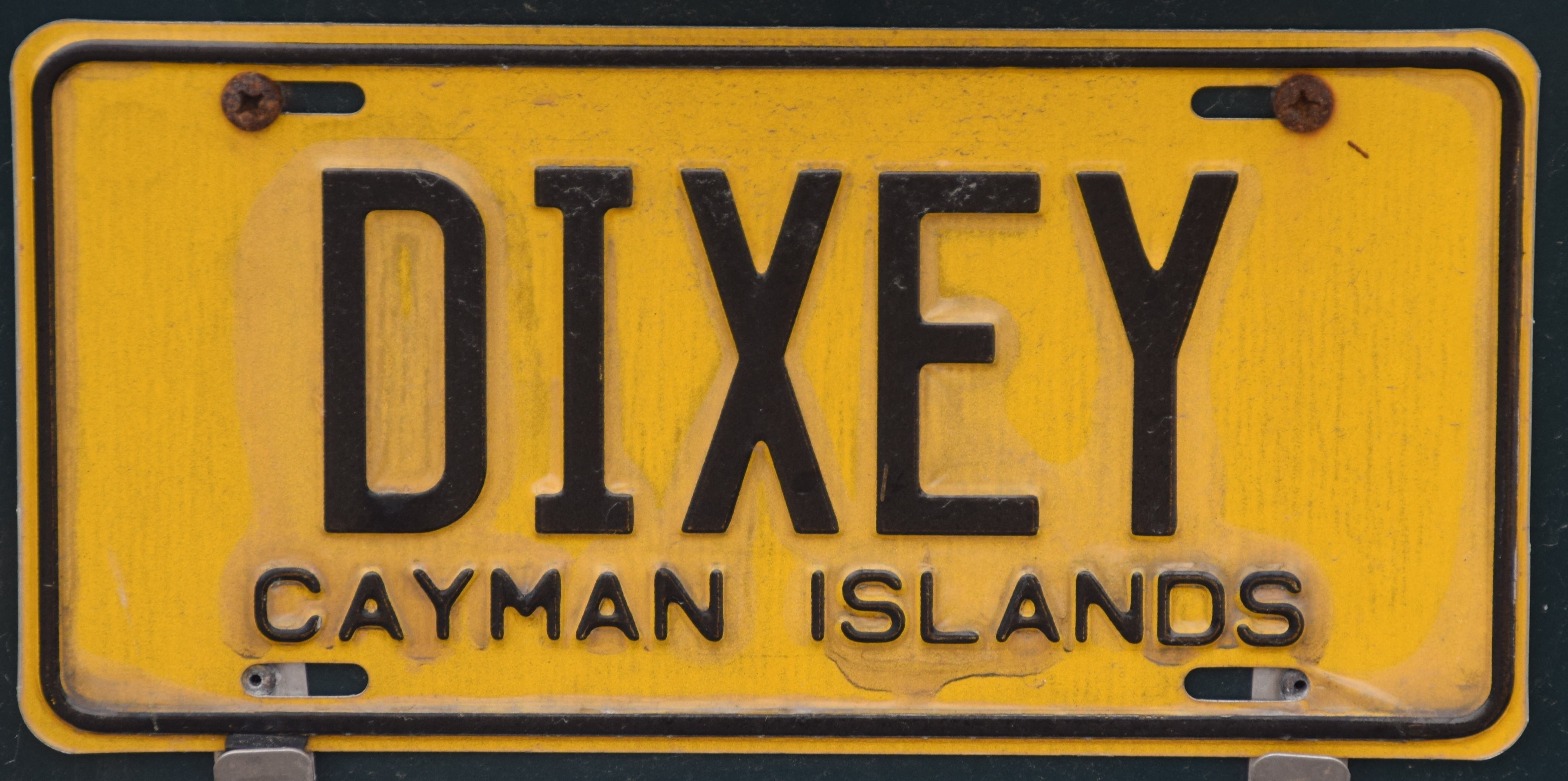 kenteken plaat van de Cayman Islands